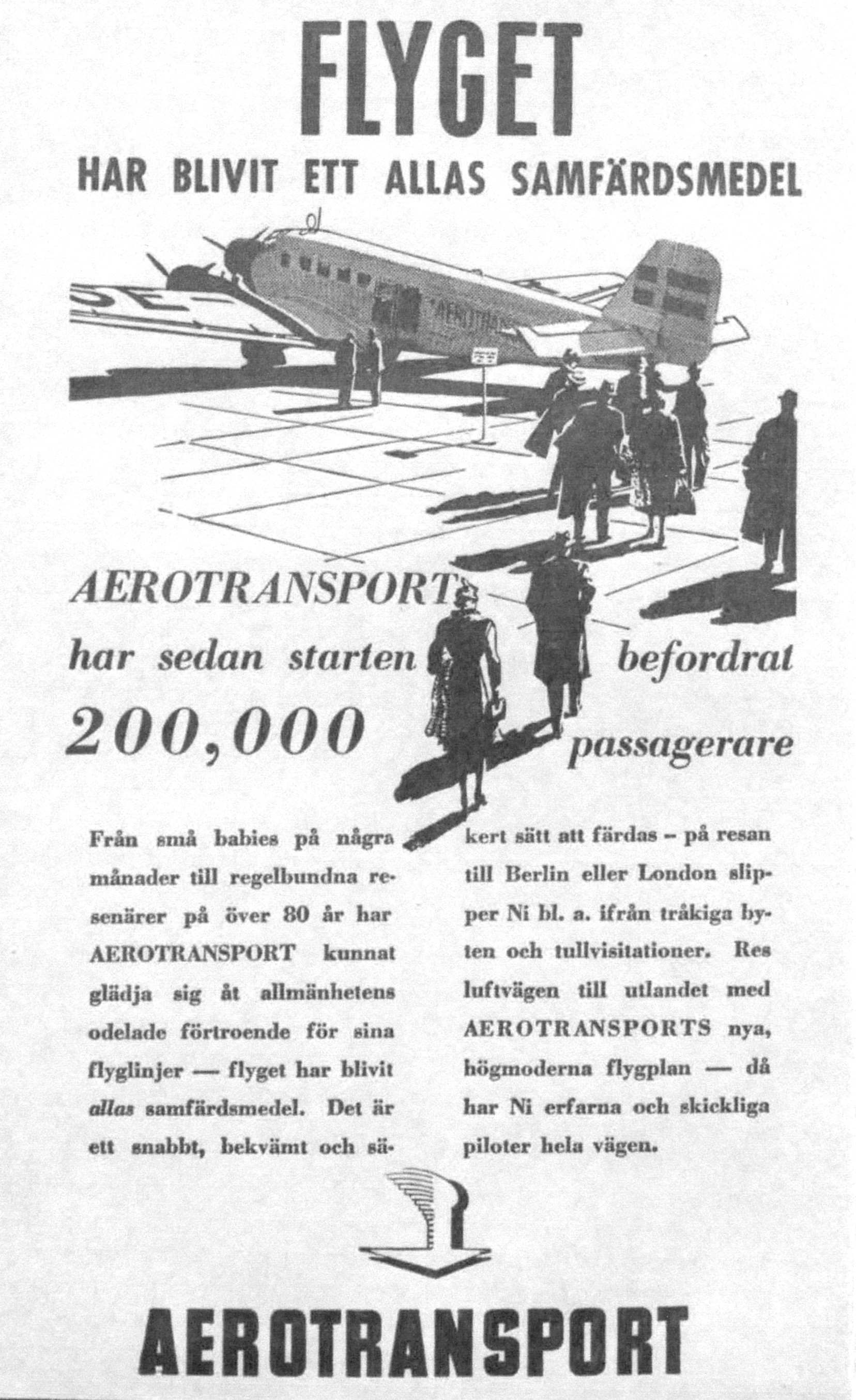 Aerotransport annons 1937